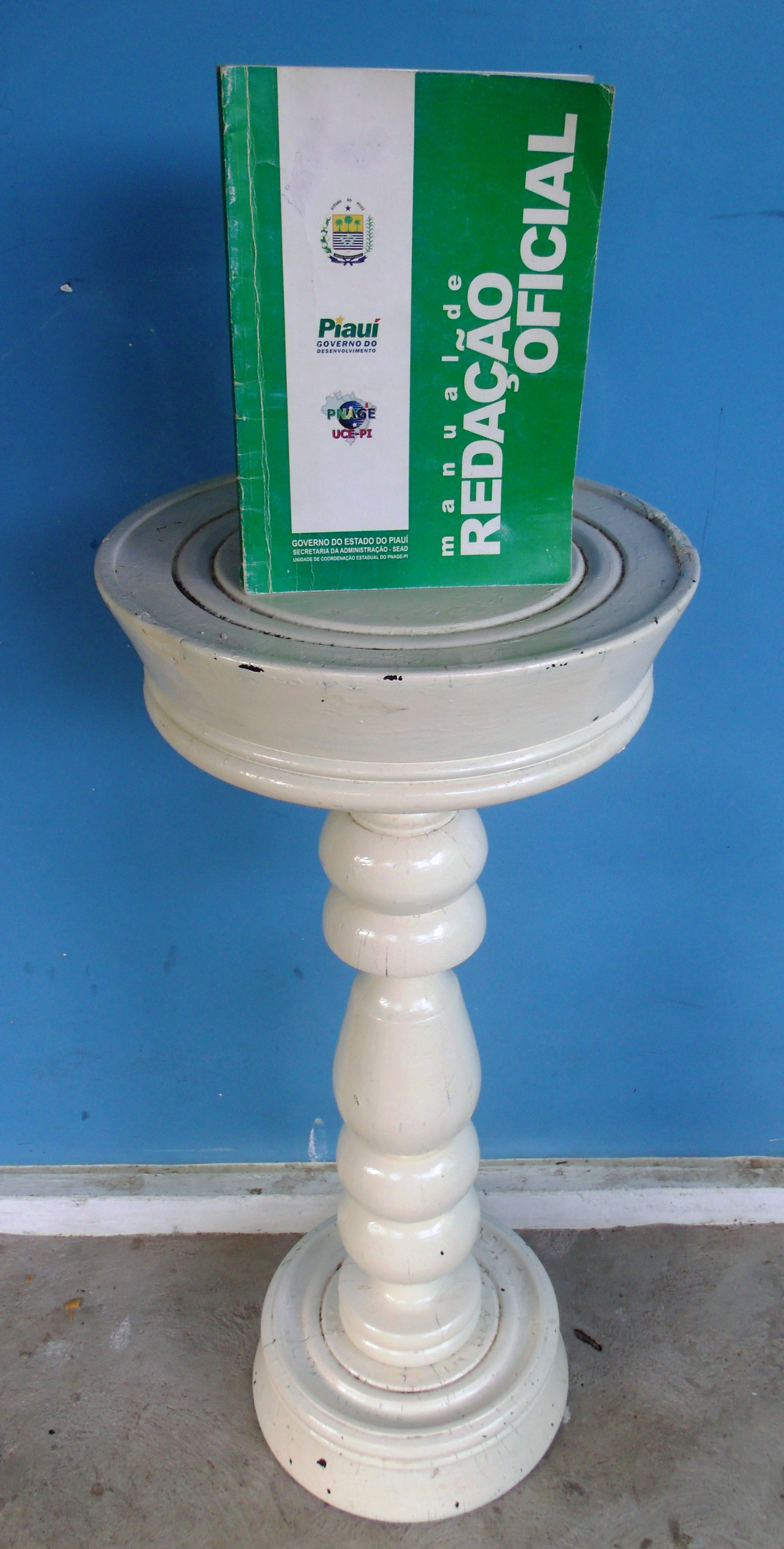 Manual de Redação Oficial do Governo do Piauí em cima de uma peça em madeira torneada.